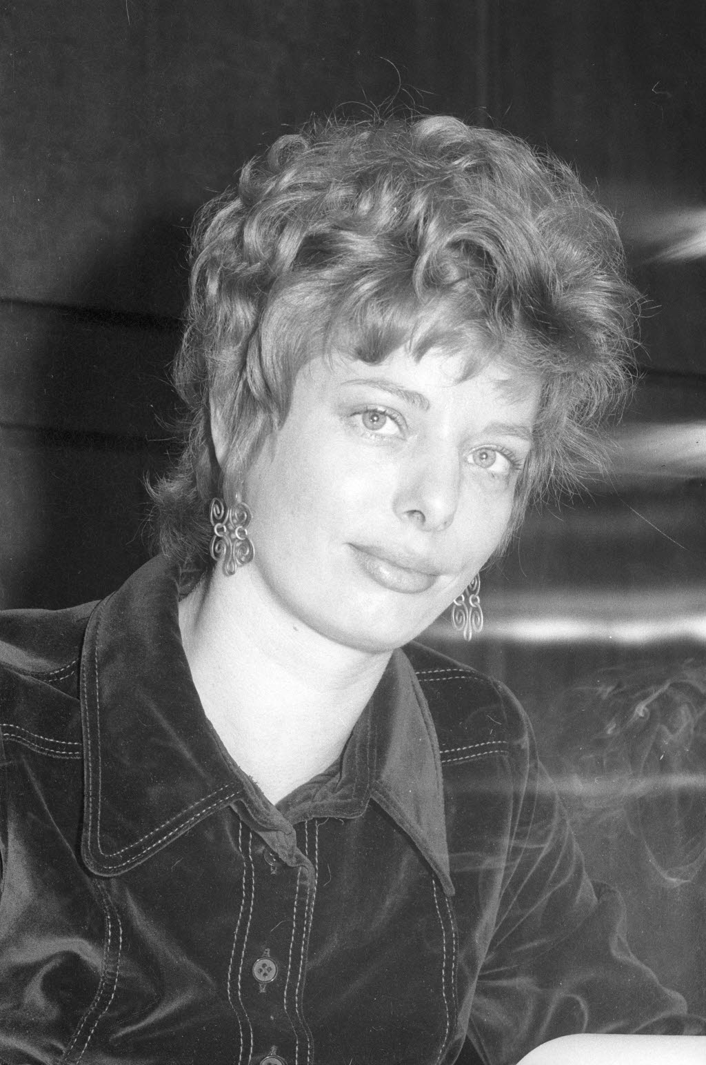 Journalistin beim Westdeutschen Rundfunk (WDR) und Hauptreferentin der Tagung des Deutschen Frauenrings in der Hermann-Ehlers-Akademie.